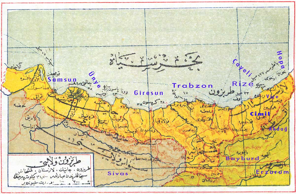 Trabzon Vilayeti